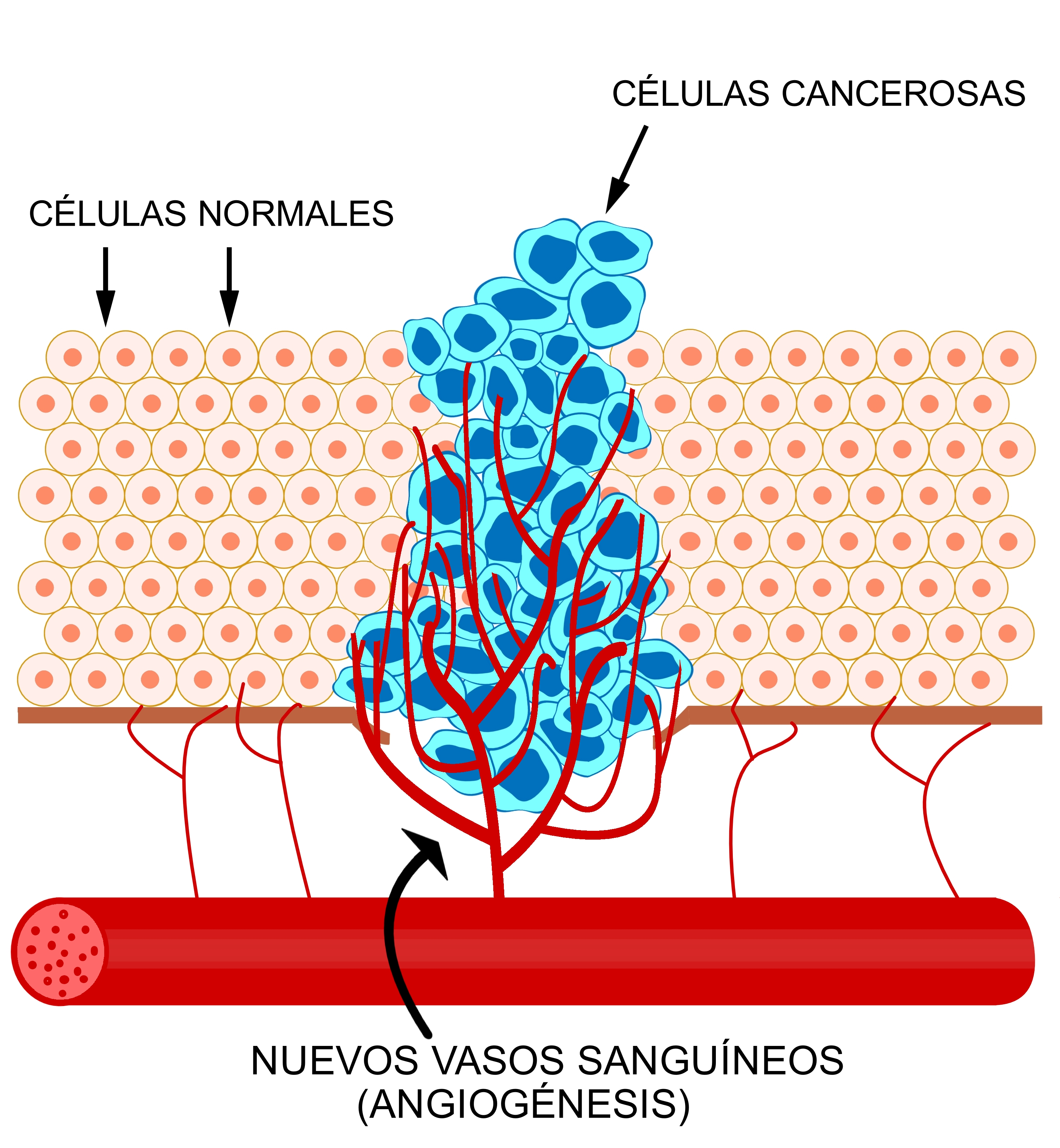 Esquema en el que se muestra el proceso de formación de nuevos vasos sanguíneos (angiogénesis) para aportar sangre a las células cancerosas.